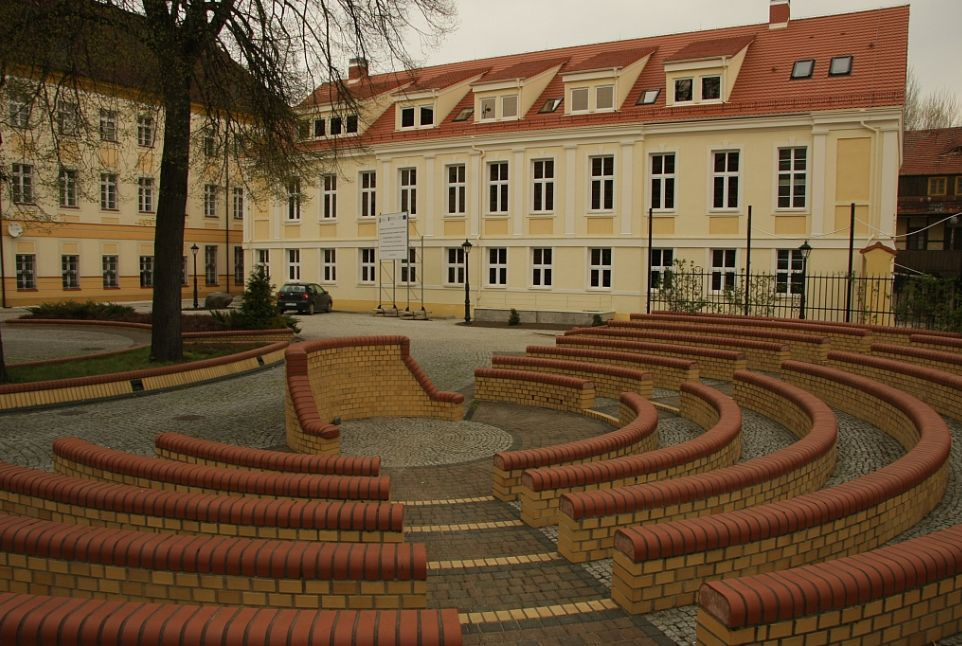 Gorzów Wielkopolski, ul. Teatralna 25 - dawny Krajowy Dom Ubogich z lat 1799 - 1801 i końca XIX w., obecnie siedziba Państwowej Wyższej Szkoły Zawodowej (zabytek nr 449/98)